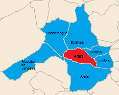 mapa arara pb